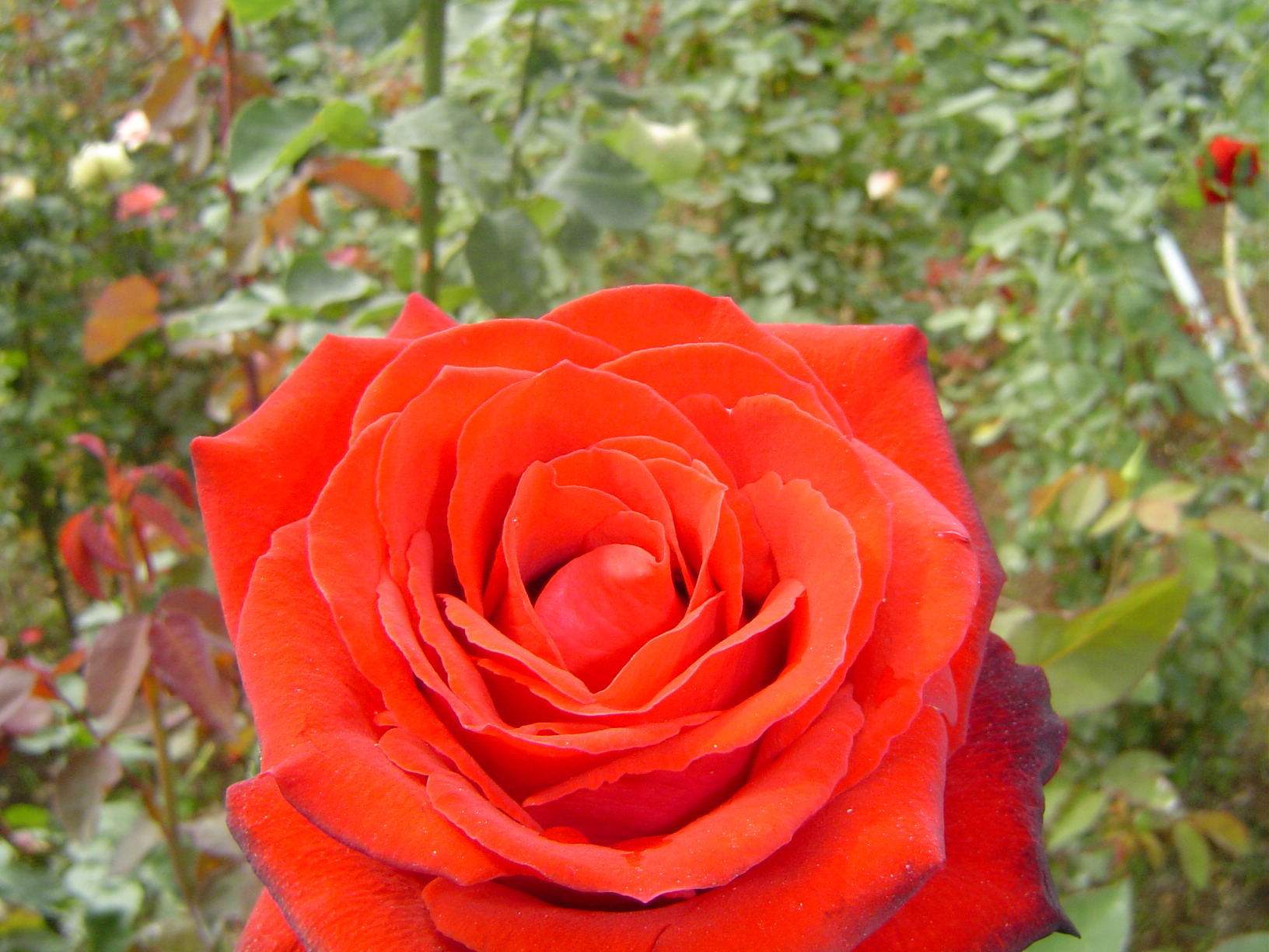 Rosas de Barbacena Principe Negro